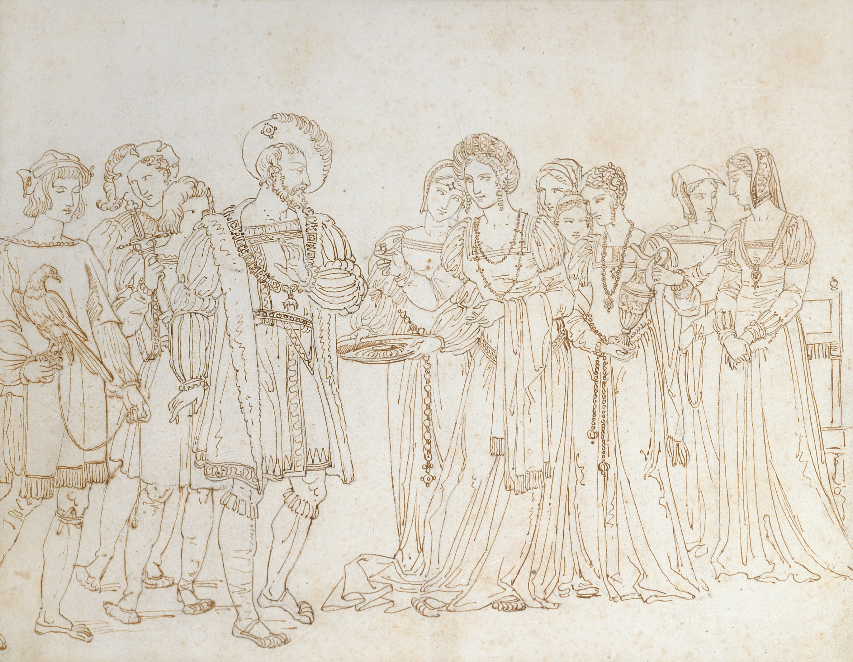 Étude pour l’Anneau de l’empereur Charles Quint, vers 1810. Plume et encre brune sur papier par Pierre Révoil, œuvre exposée au Musée de beaux-arts de Lyon en 2014.